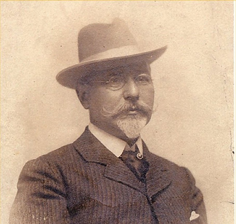 Fotografia di Ettore Roesler Franz